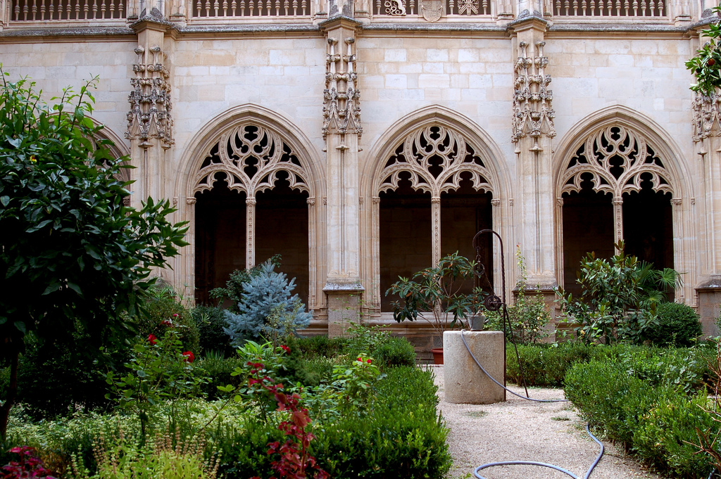 Claustro de la Iglesia San Juan de los Reyes de Toledo, España